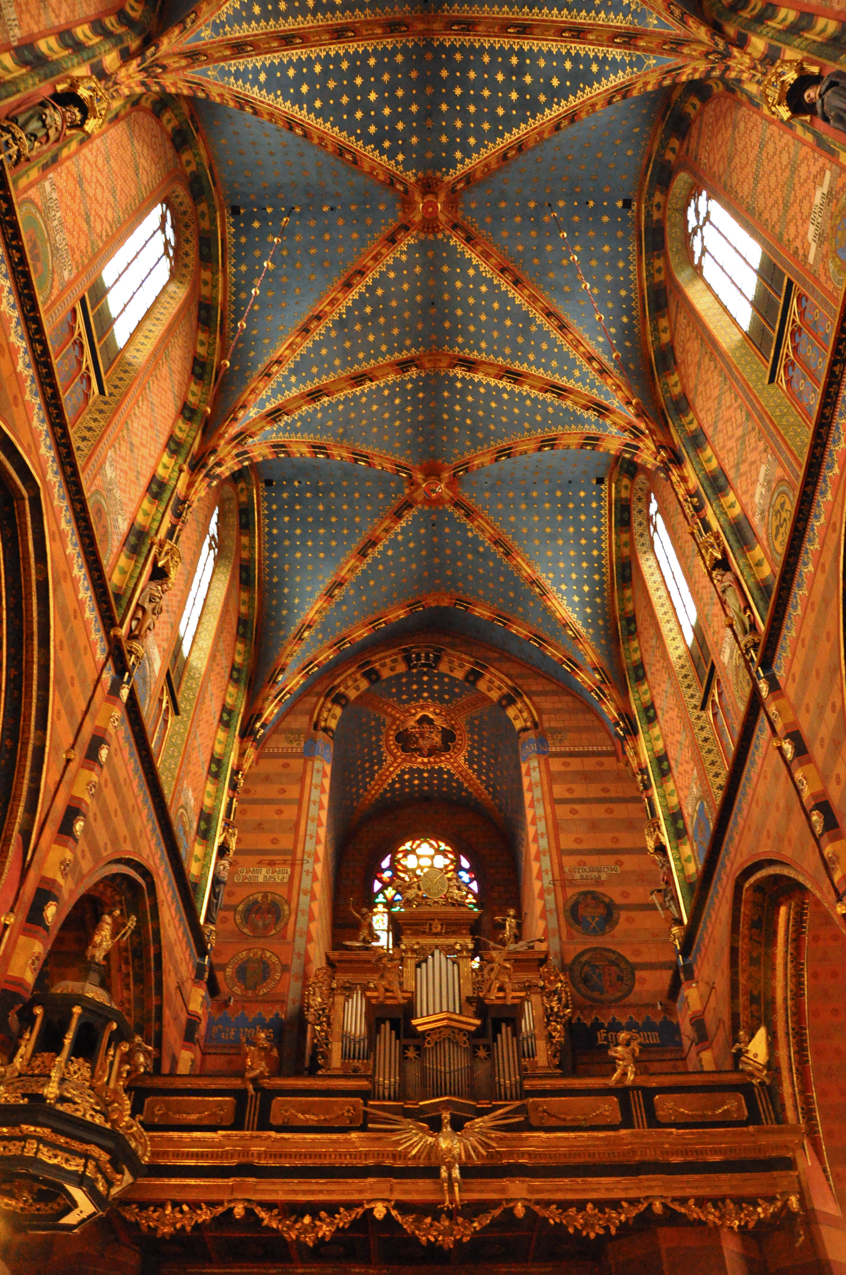 Kościół Mariacki w Krakowie